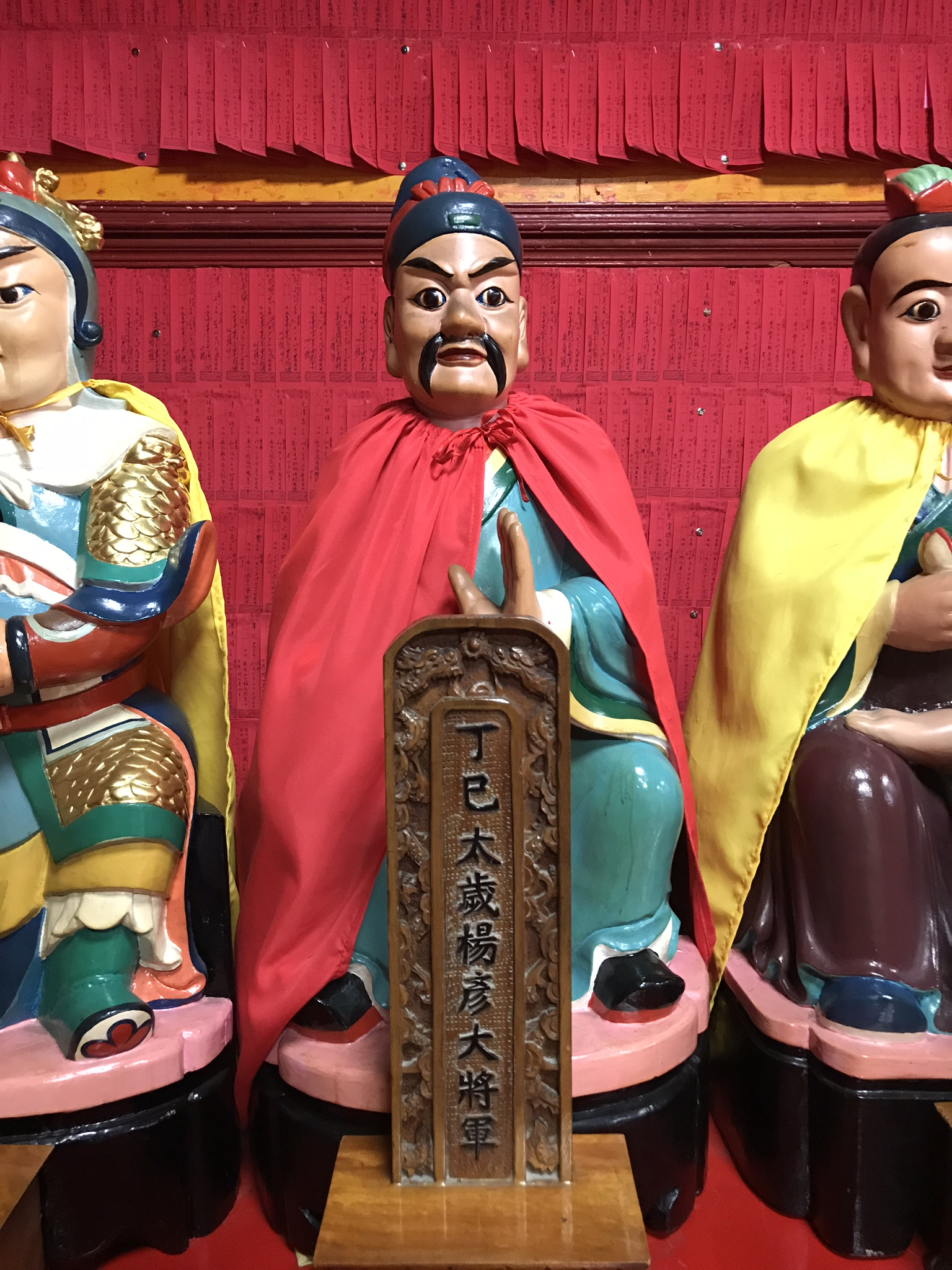 丁巳太歲楊彥大將軍神像